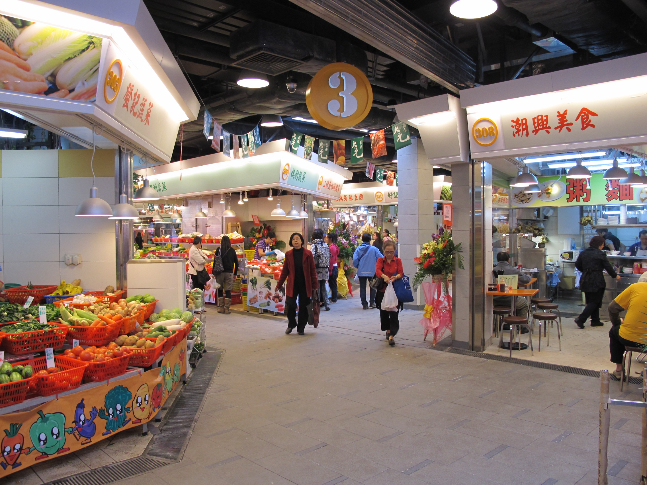 Tai Yuen Market Interior